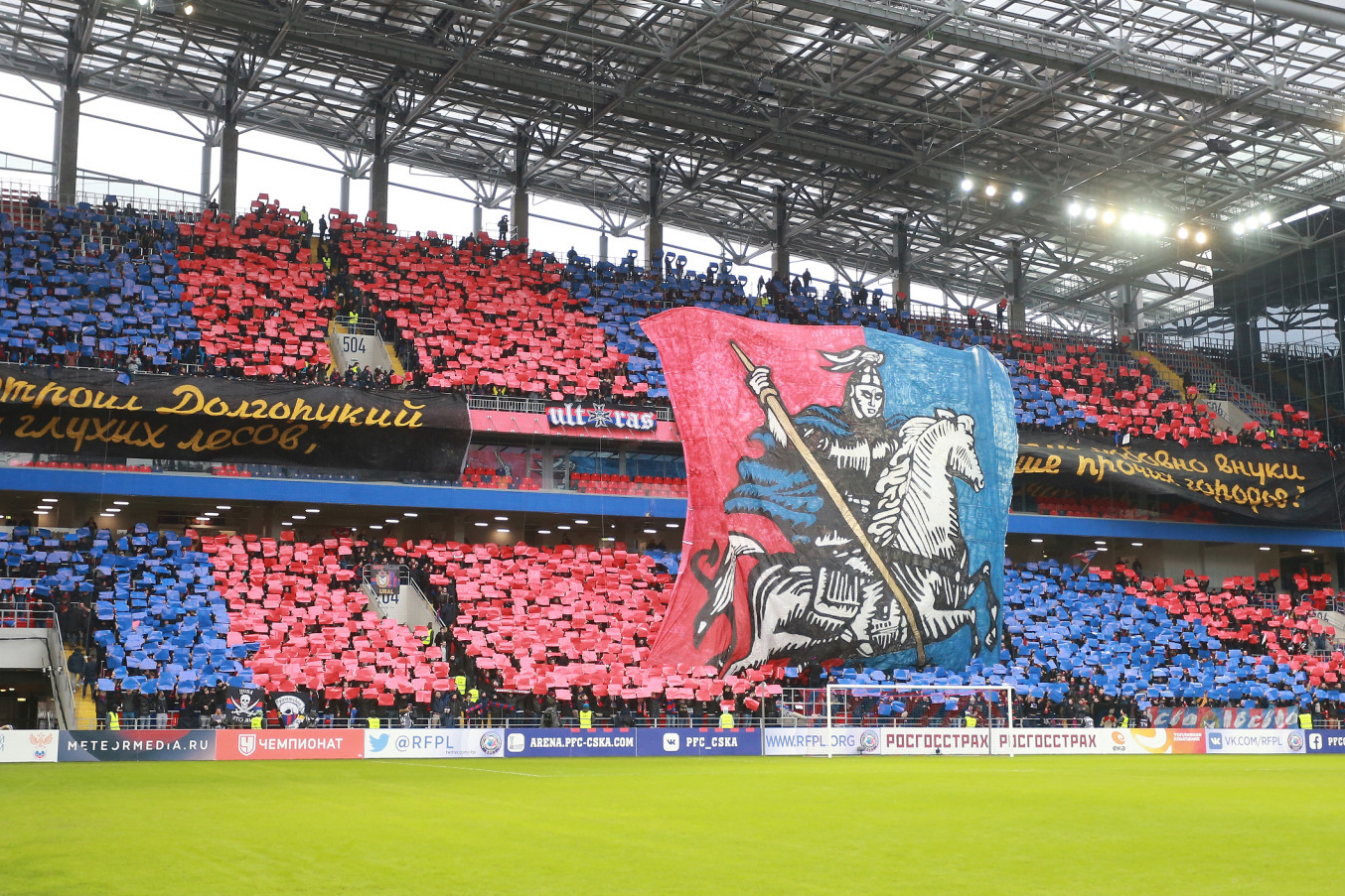 ЦСКА - «Зенит».